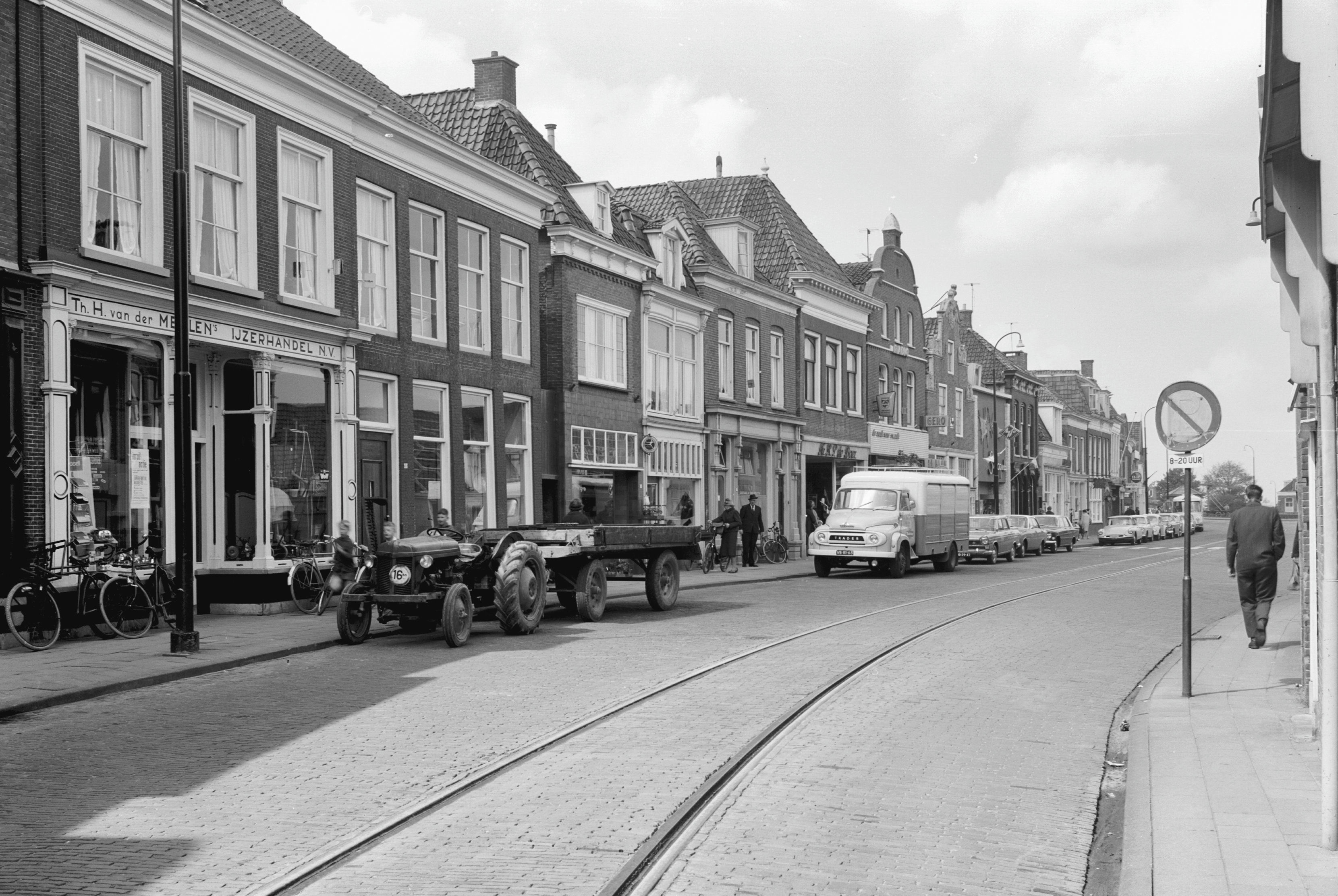 overzicht wand